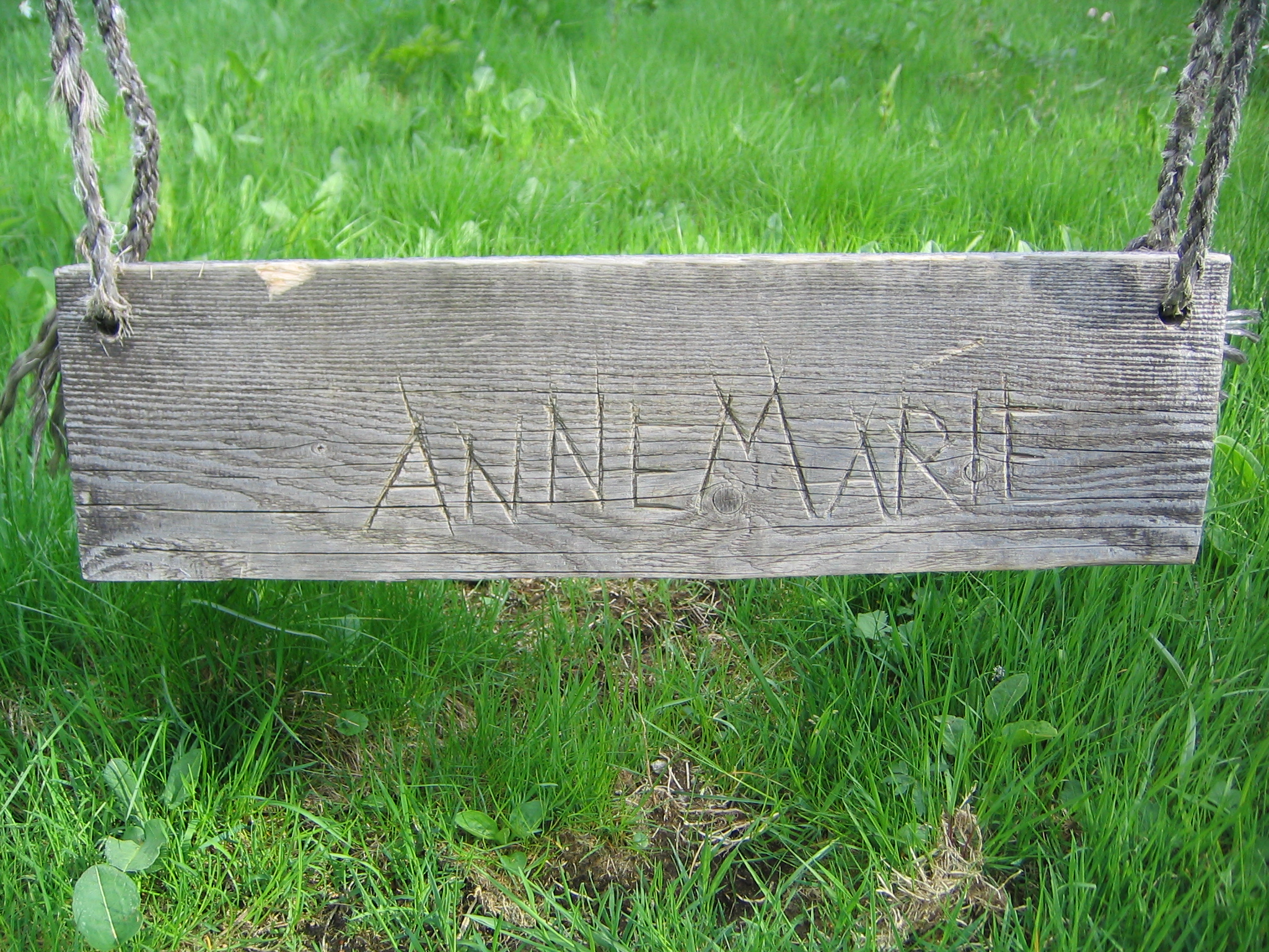 Der Wunderlehof in Feldberg-Bärental, in dem der Thriller "Black Forest" gedreht wurde